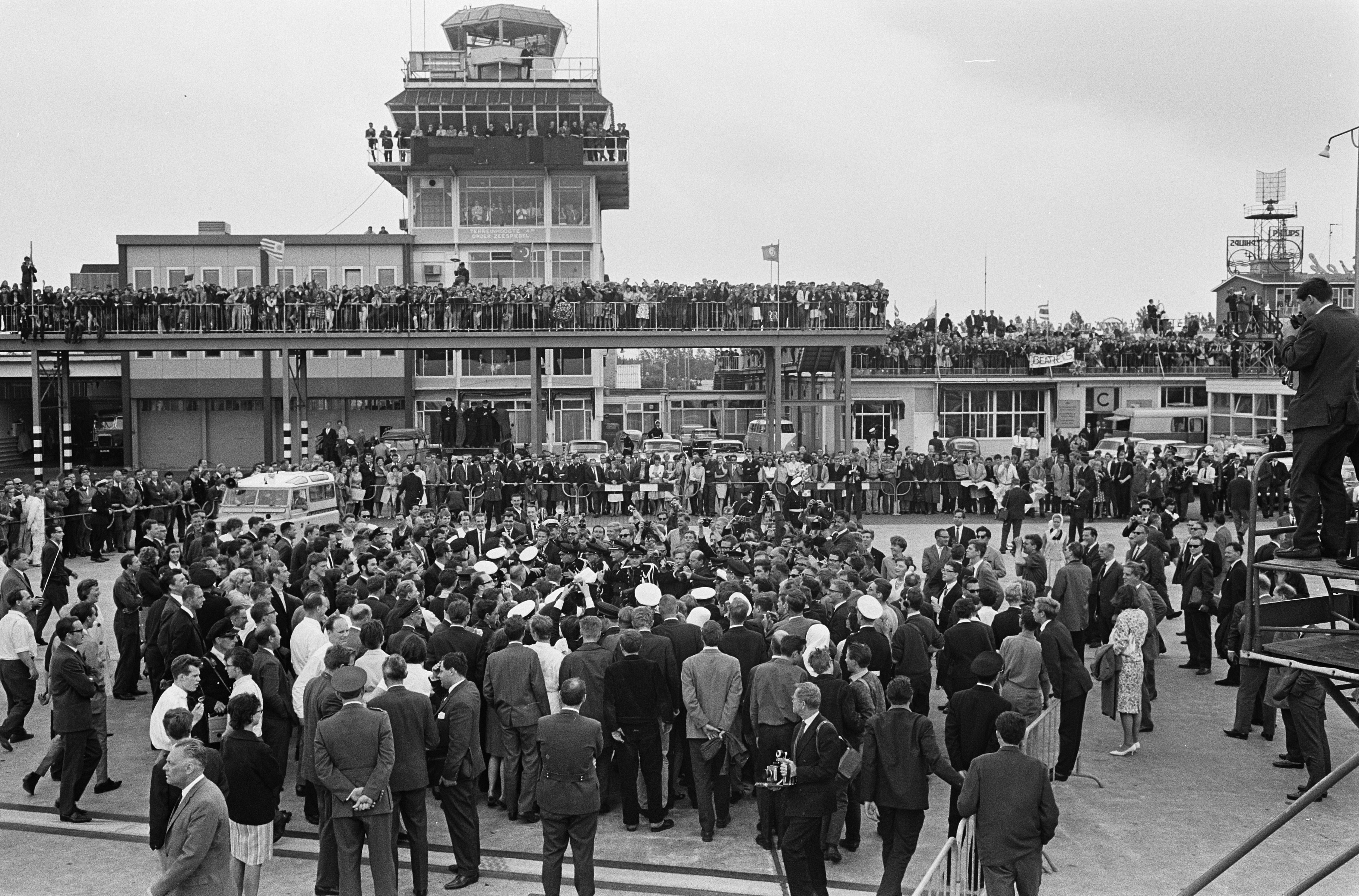 Collectie / Archief : Fotocollectie Anefo Reportage / Serie : [ onbekend ] Beschrijving : Aankomst Beatles op Schiphol, overzicht drukte op Schiphol Datum : 5 juni 1964 Locatie : Noord-Holland, Schiphol Trefwoorden : aankomsten, popgroepen, publiek, vliegvelden Instellingsnaam : Beatles Fotograaf : Pot, Harry / Anefo Auteursrechthebbende : Nationaal Archief Materiaalsoort : Negatief (zwart/wit) Nummer archiefinventaris : bekijk toegang 2.24.01.05 Bestanddeelnummer : 916-5134